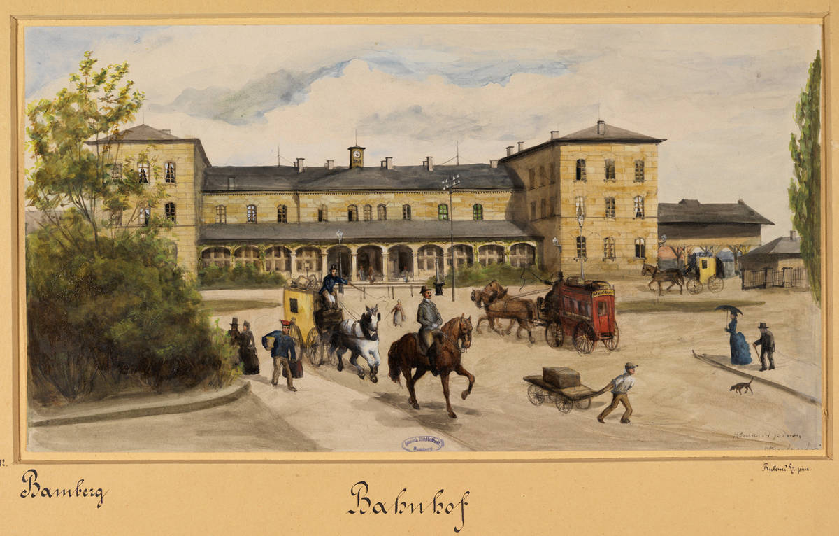 Der Bamberger Bahnhof. Aquarell von H. Ruhland, o. J. (Staatsbibliothek Bamberg, MvO A I 60)